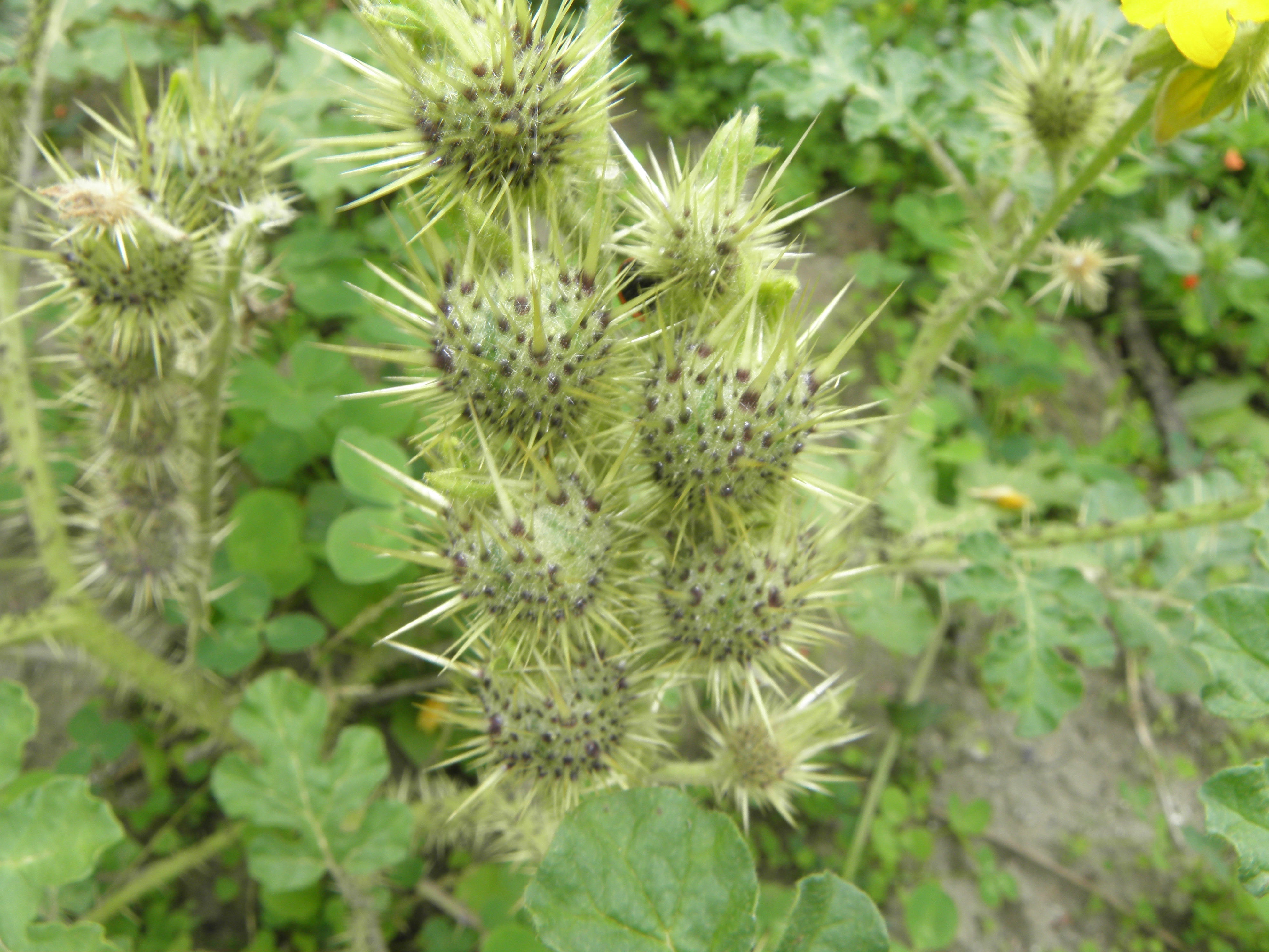 Solanum rostratum